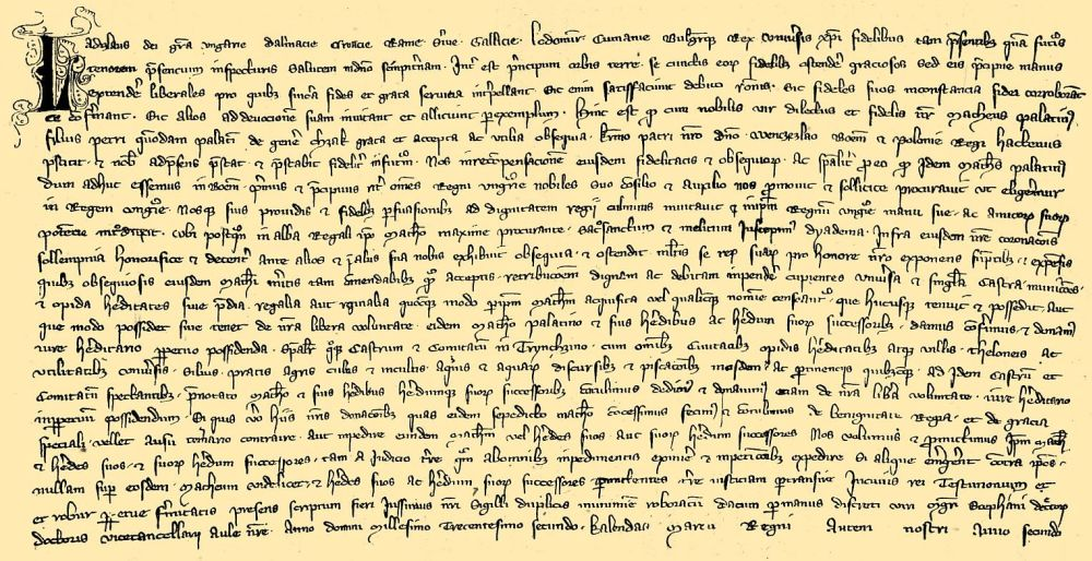 Václav III. - darovací listina z roku 1302 pro Matúše Čáka Trenčanského